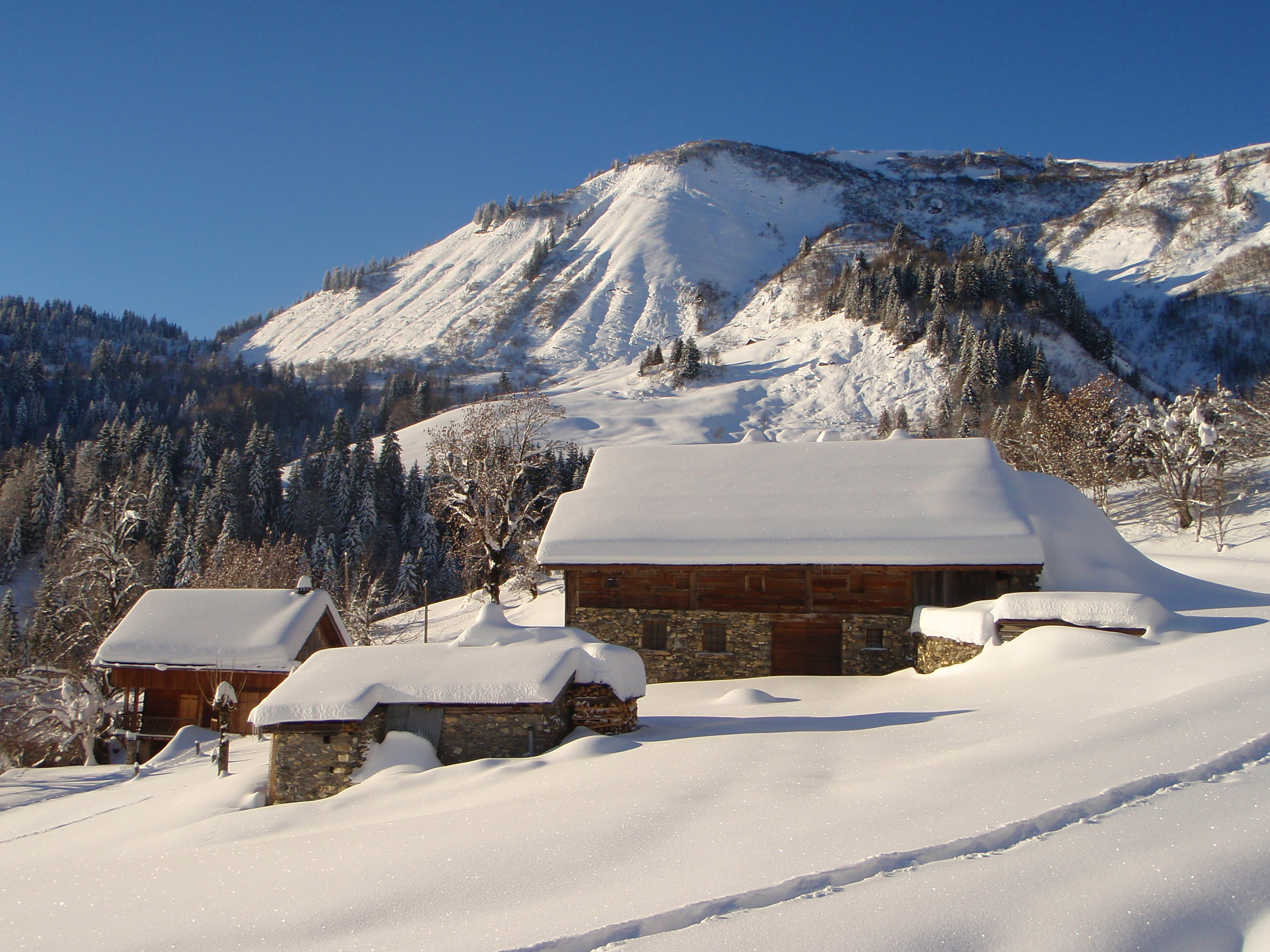 Chaucisse sous la neige Commune de Saint-Nicolas-la-Chapelle (Savoie) Novembre 2008